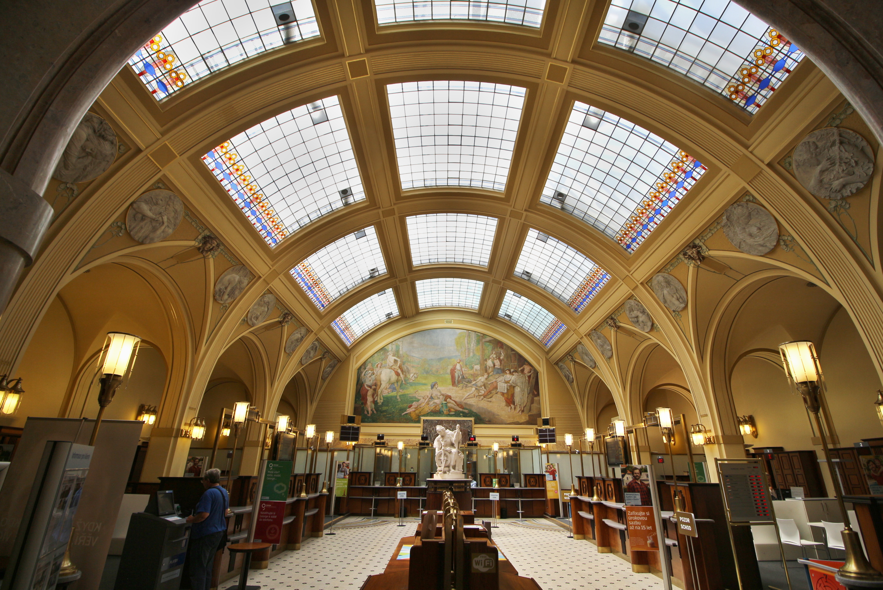 Vršovická záložna, interiér